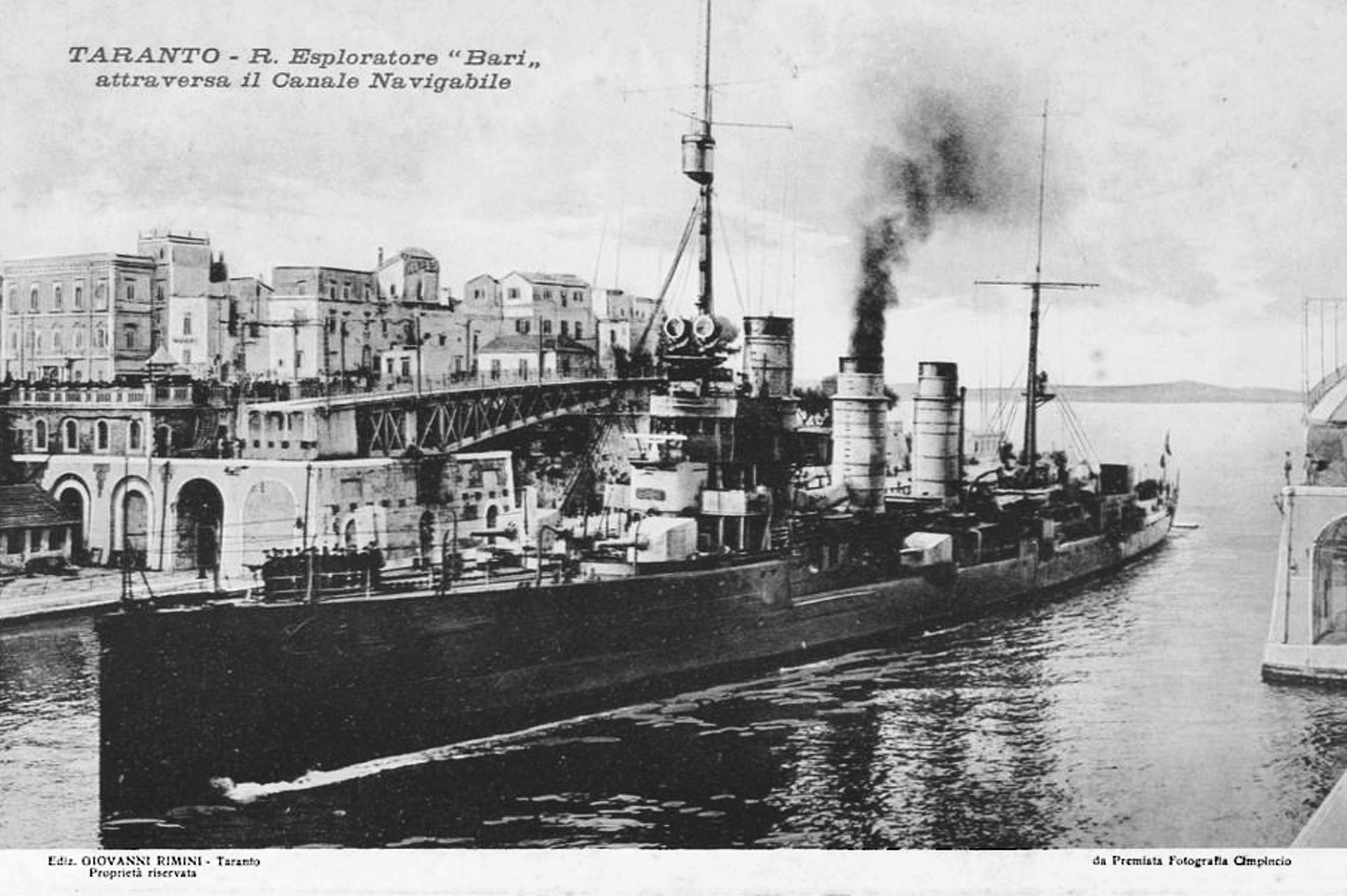 L’incrociatore leggero Bari in transito nel canale navigabile di Taranto.